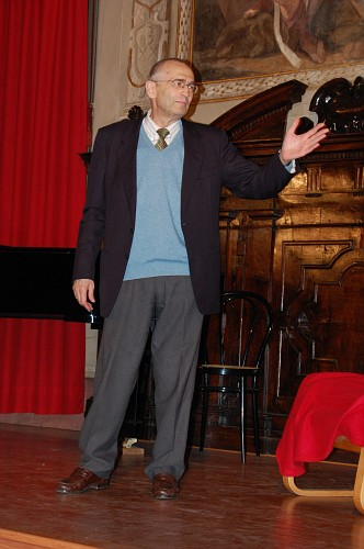 Giuliano Ciannella alla sala S.Rocco di Bologna nell'aprile 2007